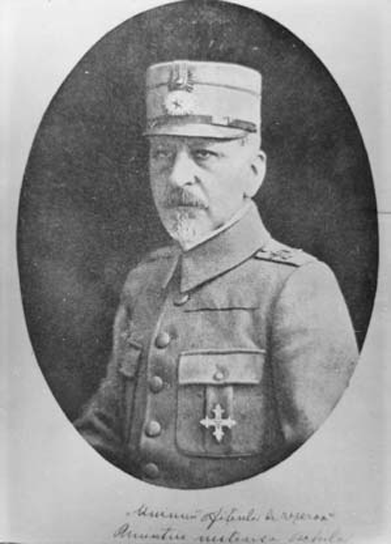 1929 - Constantin Prezan (România) cu gradul de Mareşal al României